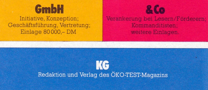 Das ursprüngliche Farbspektrum des ÖKO-TEST-Magazins